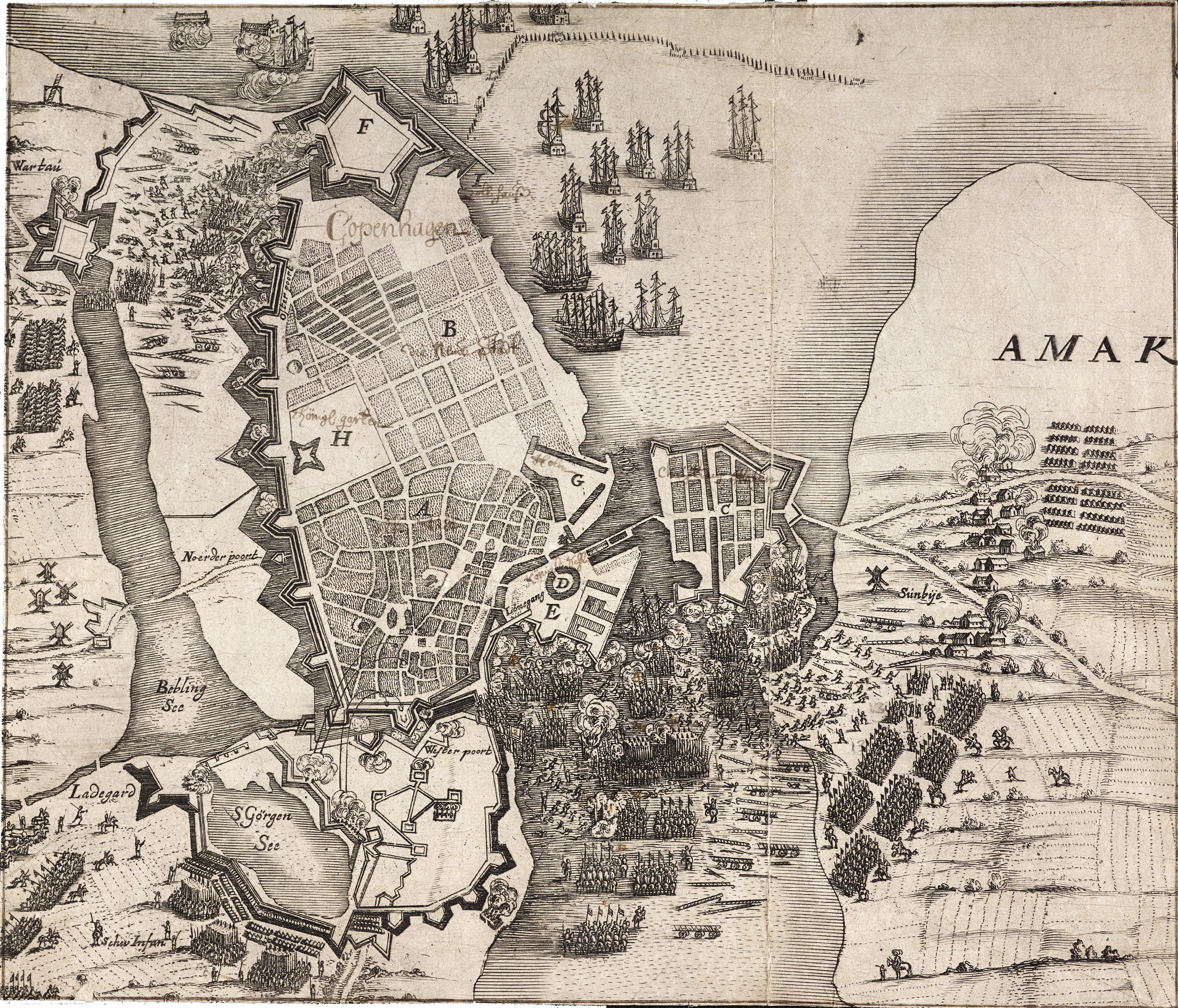 Københavns belejring 1658-1659. Samtida kobberstik.